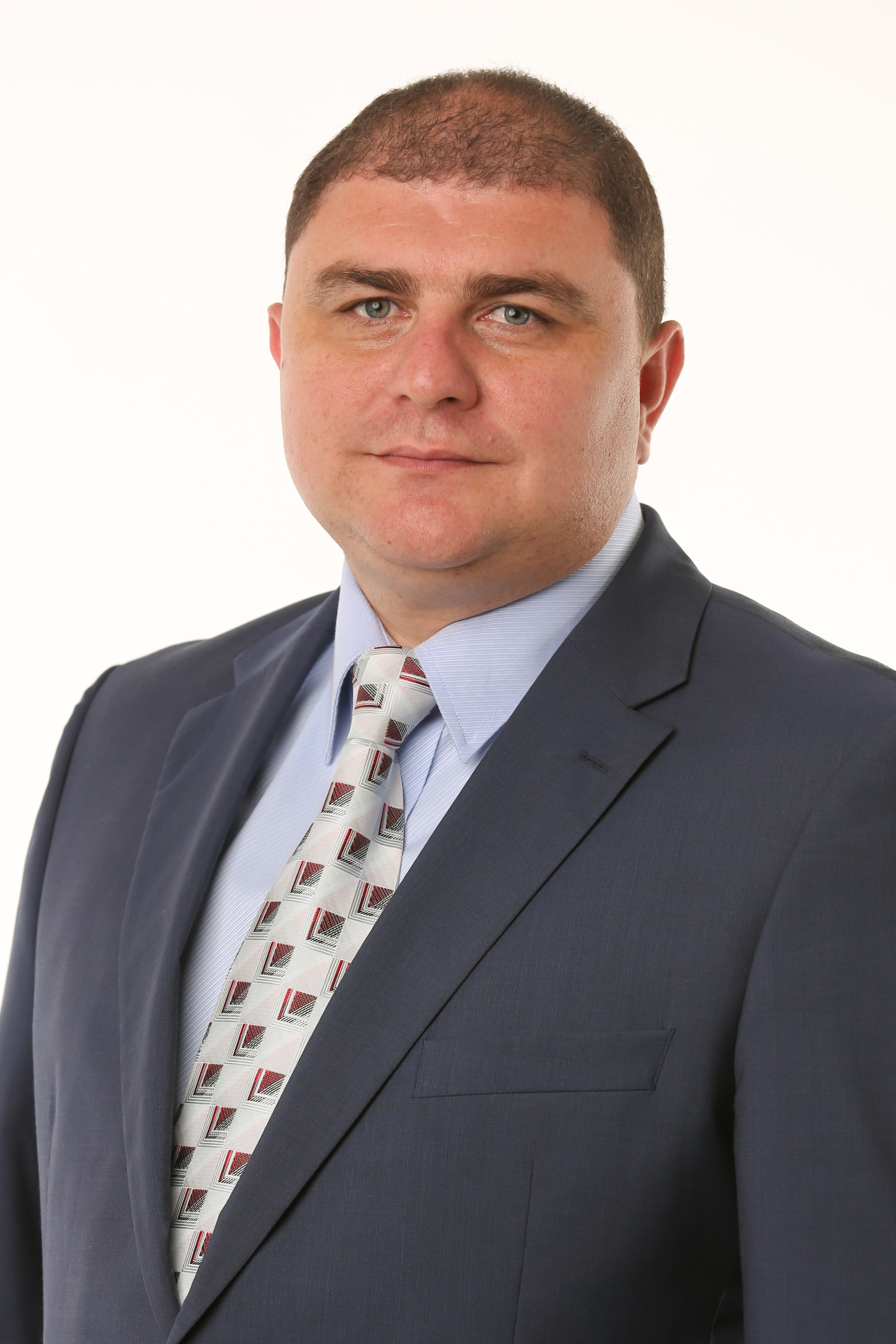 Временно исполняющий обязанности Губернатора и Председателя Правительства Орловской области